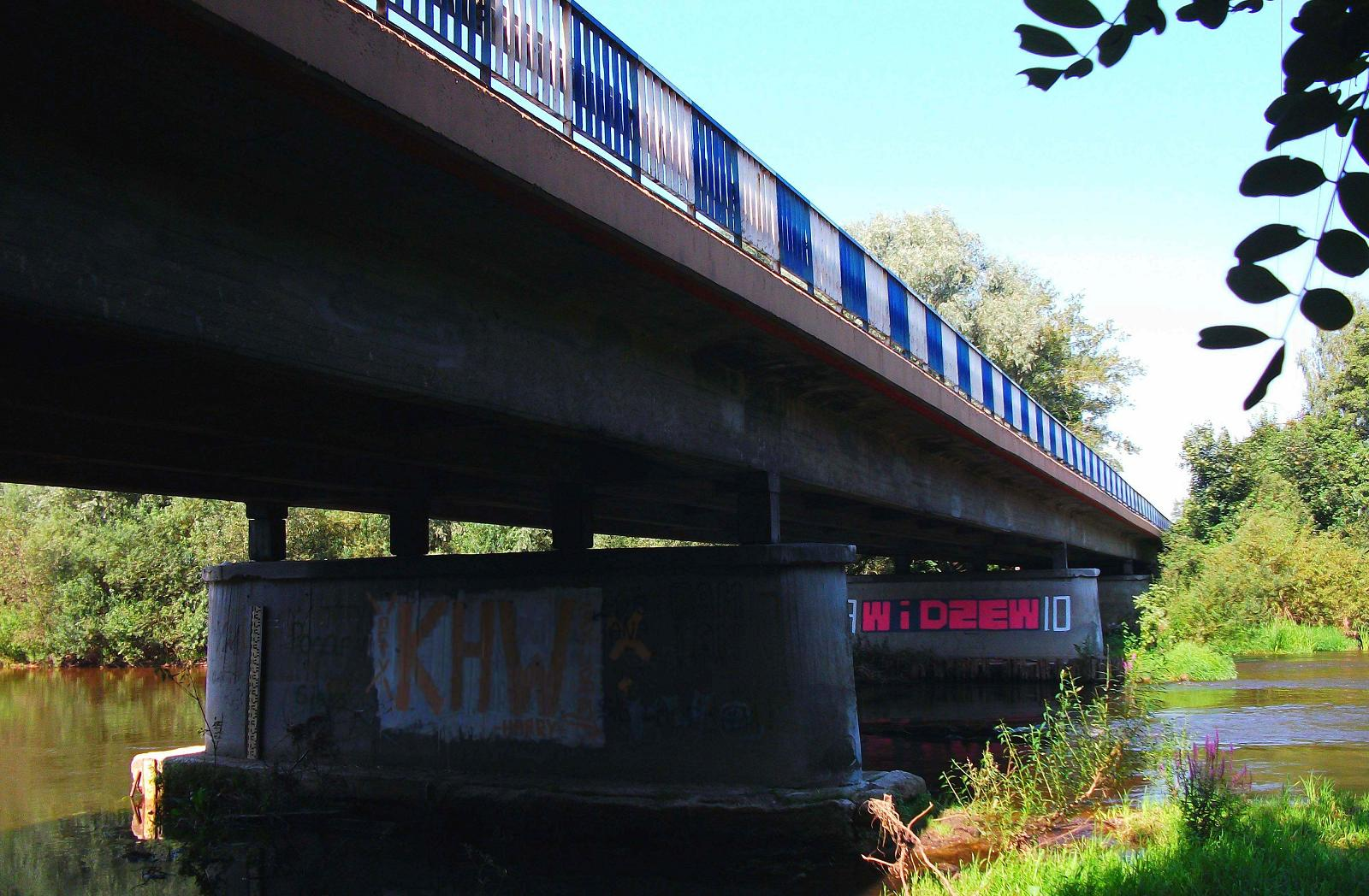 Most w ciągu drogi 486 - przez rzekę Warta w miejscowości Krzeczów